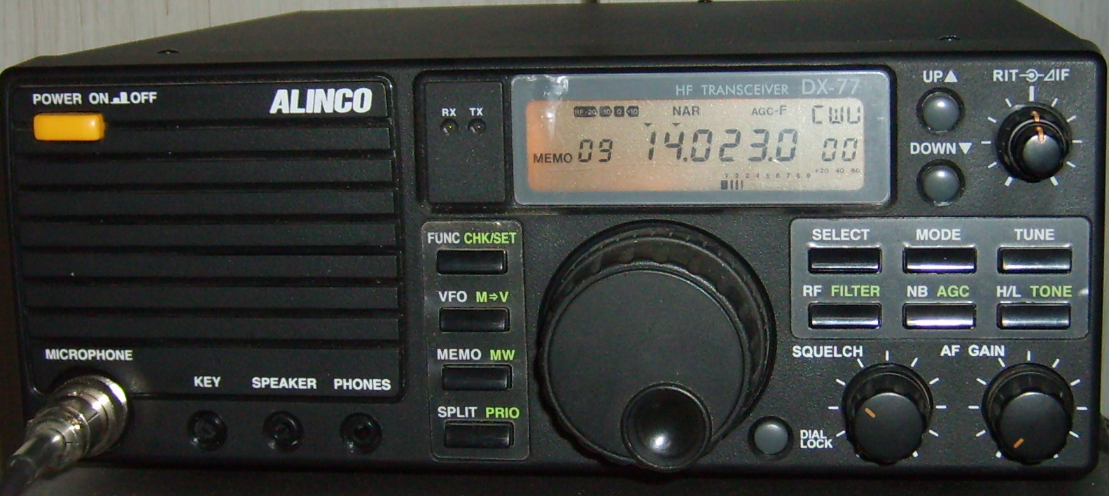 Alinco DX77E